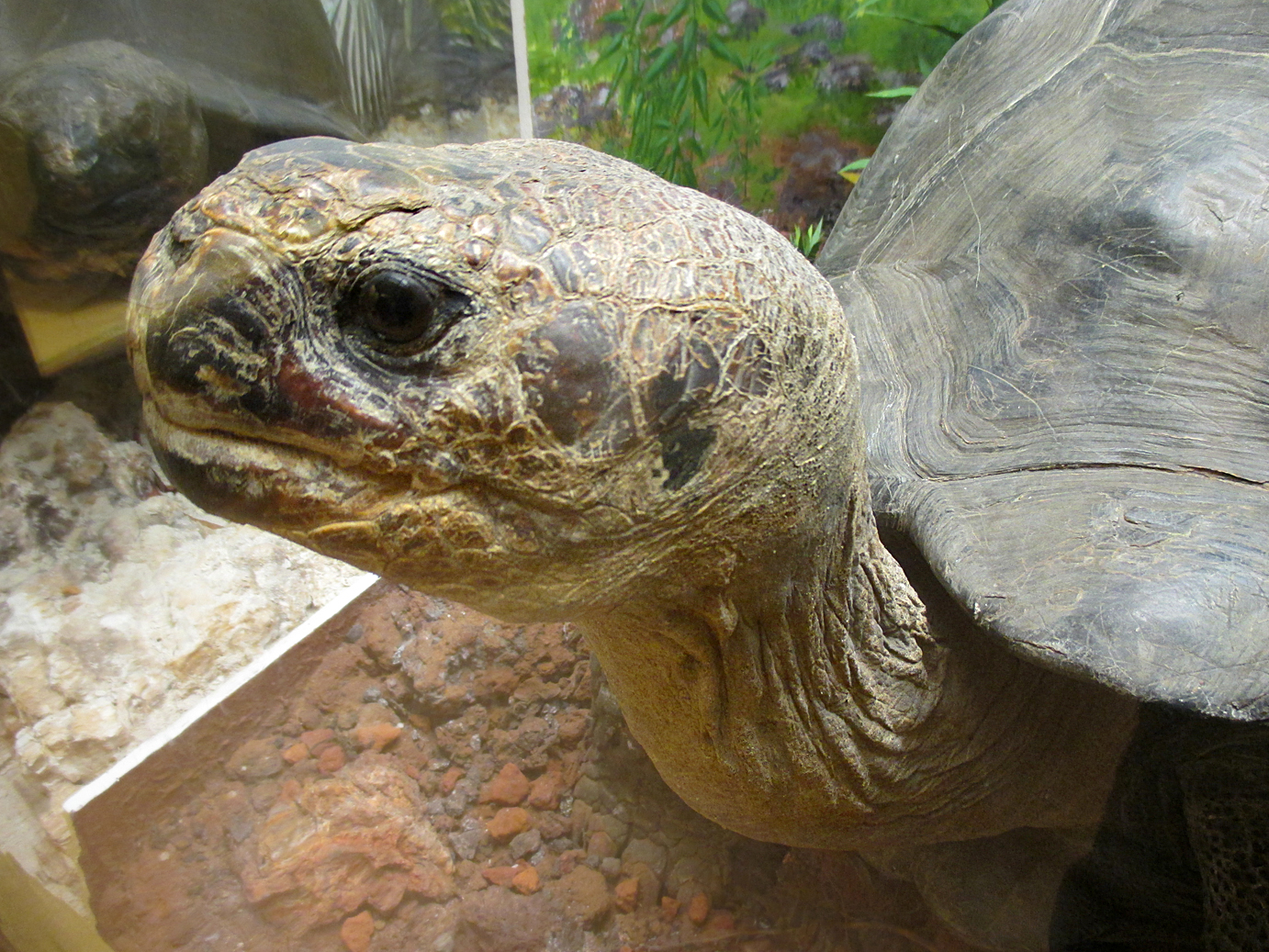 Uppstoppad Galapagossköldpadda (Chelonoidis nigra) från Galápagosöarna på Göteborgs Naturhistoriska Museum, Göteborg, Sverige.